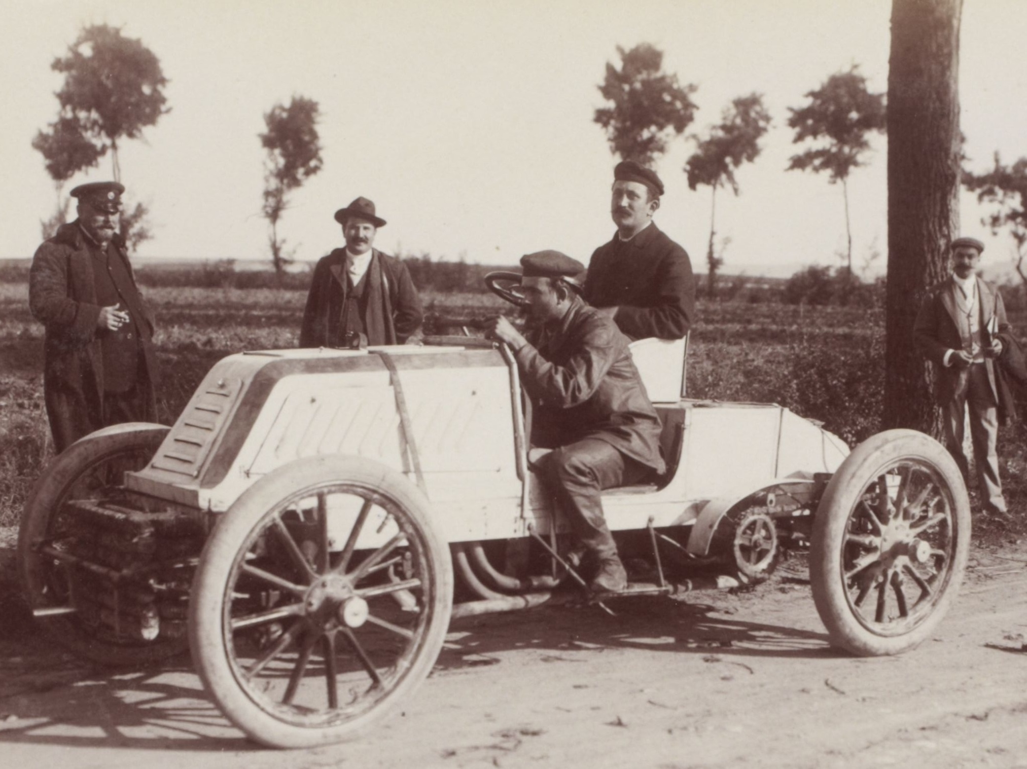 [Collection Jules Beau. Photographie sportive] : T. 19. AnnÃ©e 1902 / Jules Beau : F. 29v. [Meeting de cÃ´te d'automne, Le KilomÃ¨tre dÃ©part lancÃ© en cÃ´te, ChÃ¢teau-Therry, 28 septembre, Gaillon, 5 octobre 1902]